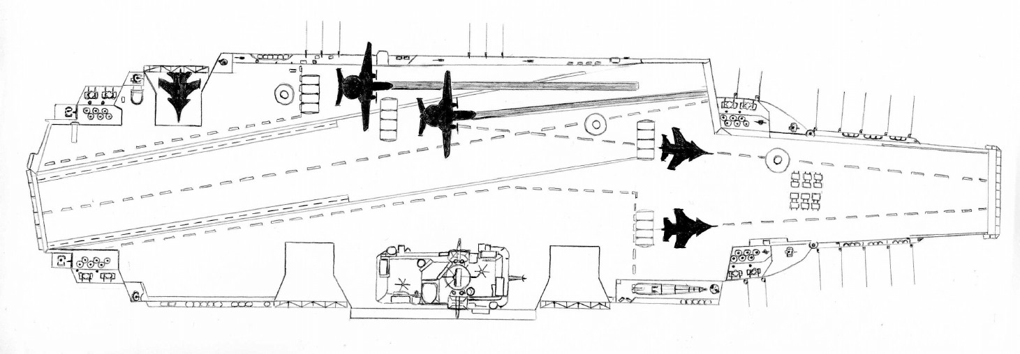 Самолеты Як-44 и МиГ-29 на палубе ТААКР "Ульяновск"